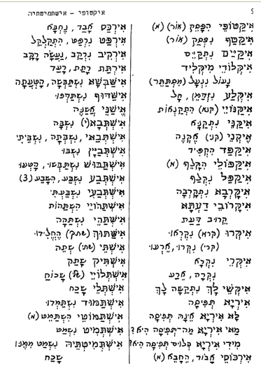 מילון עזרא ציון מלמד מהדורה ראשונה